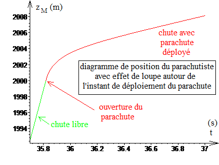 Tracé du diagramme horaire de position d'un parachutiste tombant d'abord en chute libre puis avec parachute déployé avec effet de loupe autour de l'instant d'ouverture du parachute